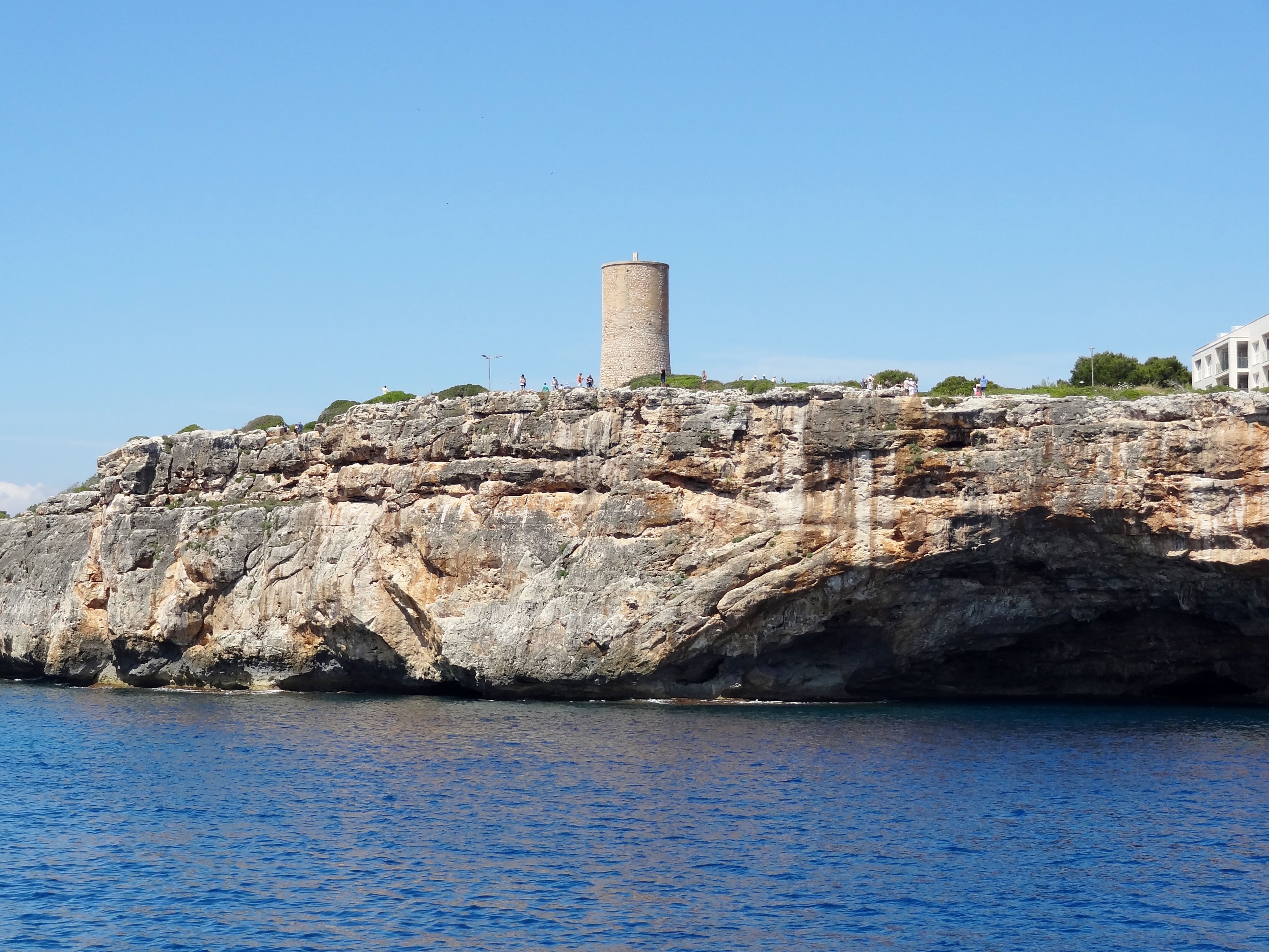 Torre del Serral dels Falcons in der Gemeinde Manacor, Mallorca, Spanien